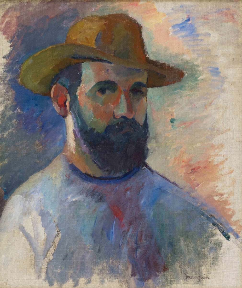 Autoportrait, Henri Charles Manguin, 1905. Huile sur toile, 55 x 46 cm. Collection privée.